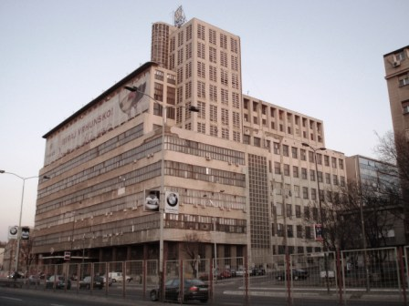 Фотографија зграде Државне штампарије архитекте Драгише Брашована саграђене 1934-1941. Аутор фотографије: Nicolo